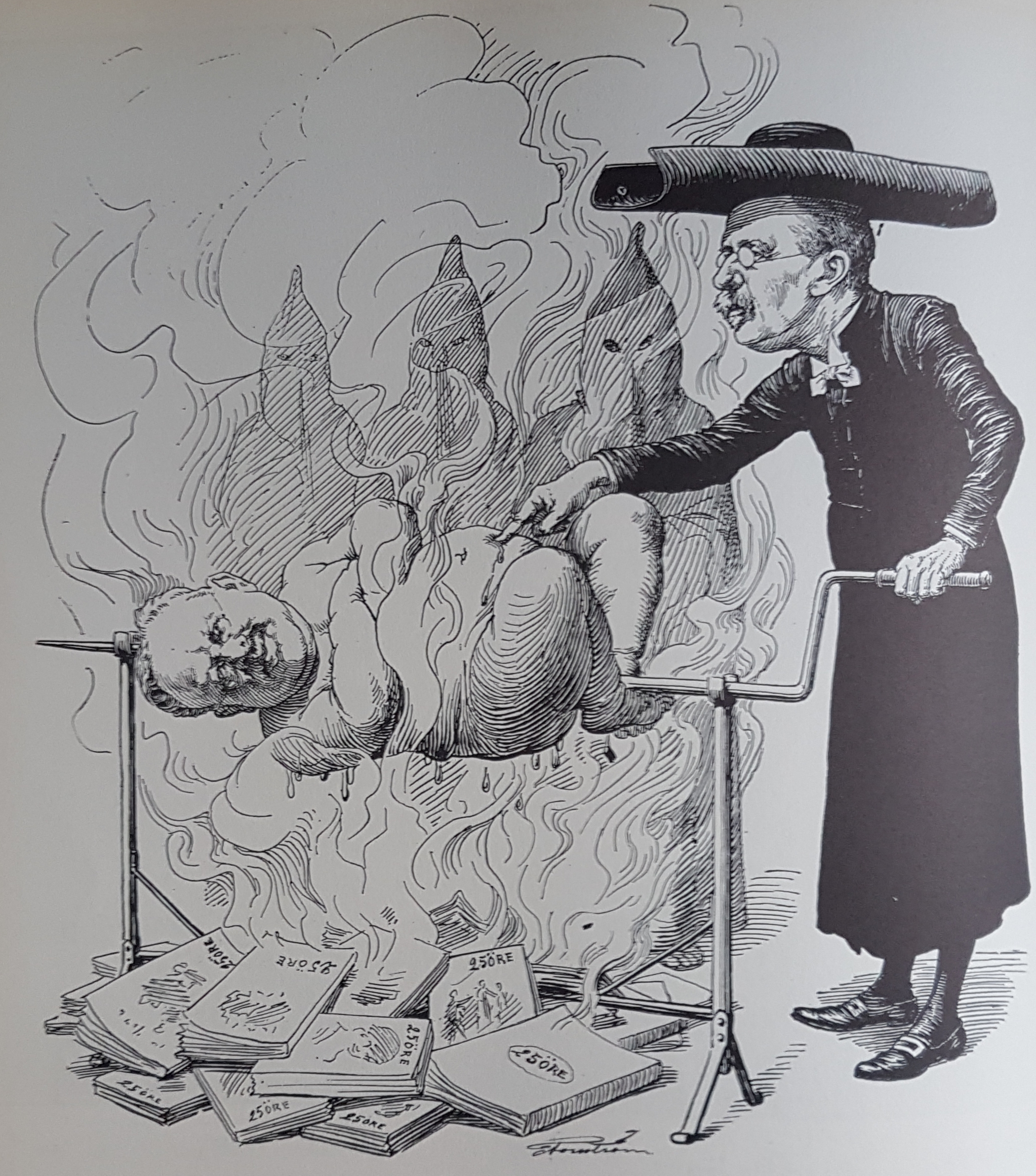 Bengtzén skall stekas. Tuschkariktyr av Karl Hjalmar Lundgren och Fridtjuv Berg i Puck 1914 tecknad av Edvard Forsström, avfotograferad bild från Allhems Svenskt konstnärslexikon.